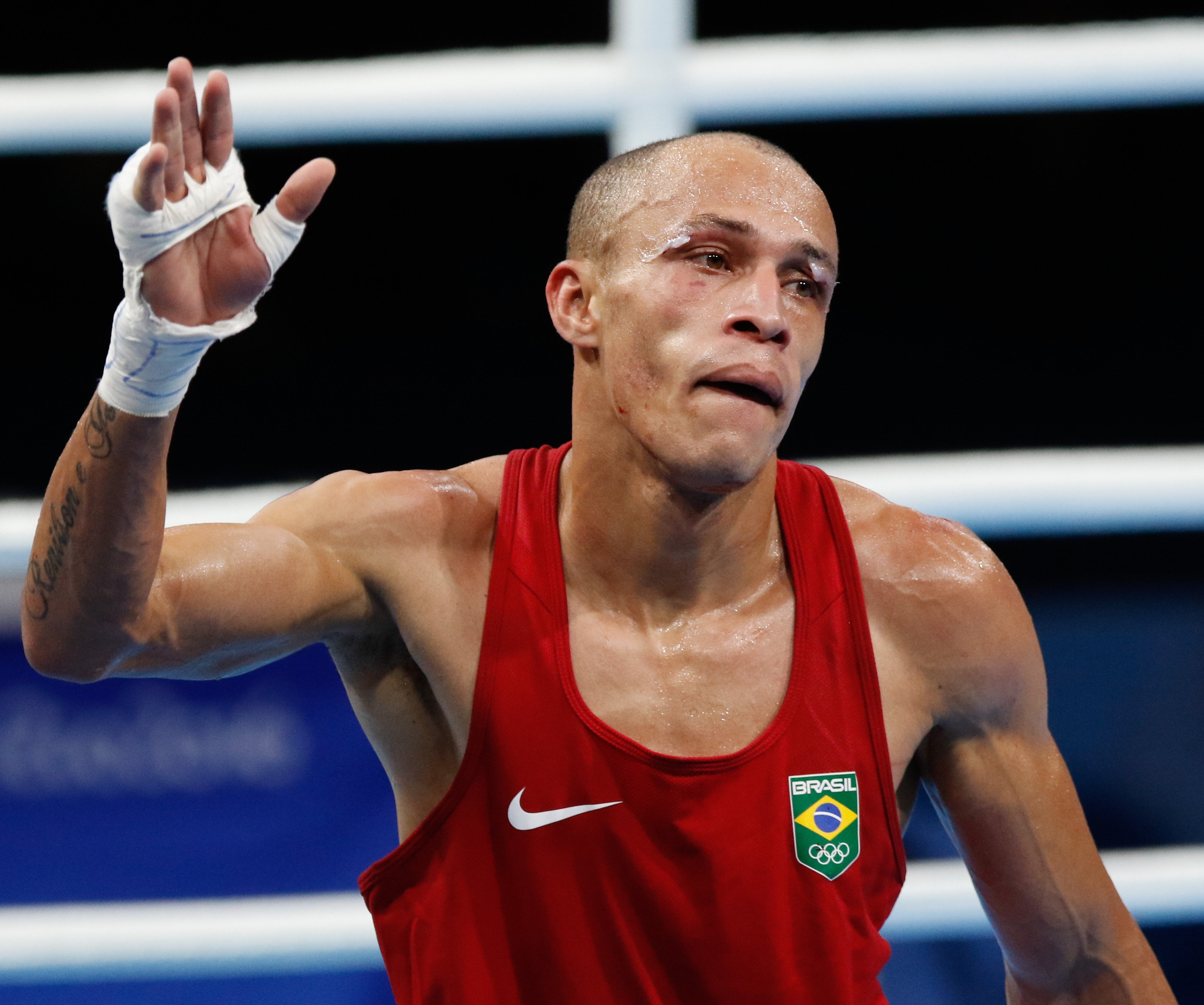 Rio de Janeiro - Boxeador brasileiro Robenilson de Jesus sofre derrota para o norte-americano Shakuer Stevenson na categoroa at 56kg. (Fernando Frazão/Agência Brasil)